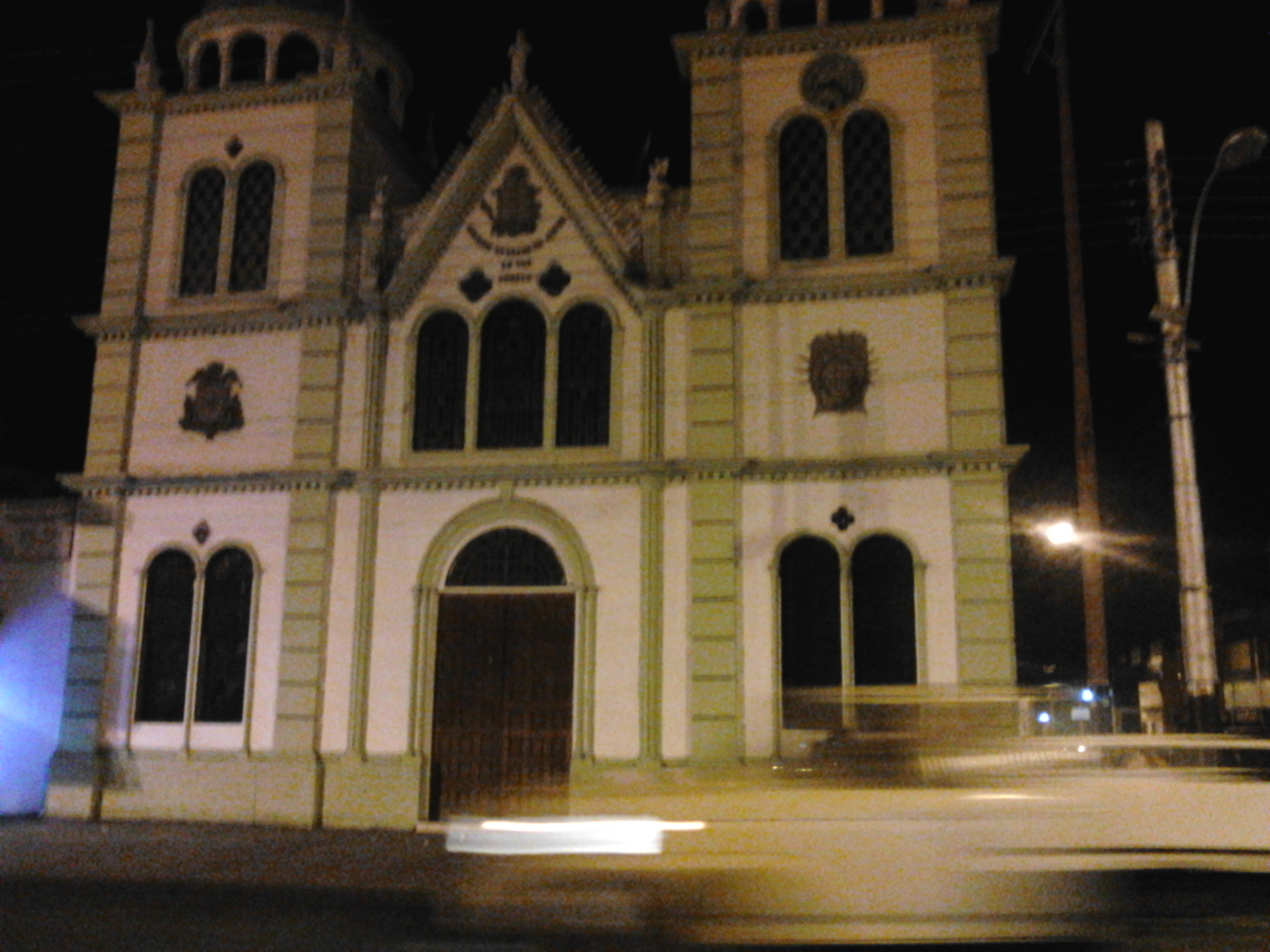 Iglesia San José, Tucupita Estado Delta Amacuro